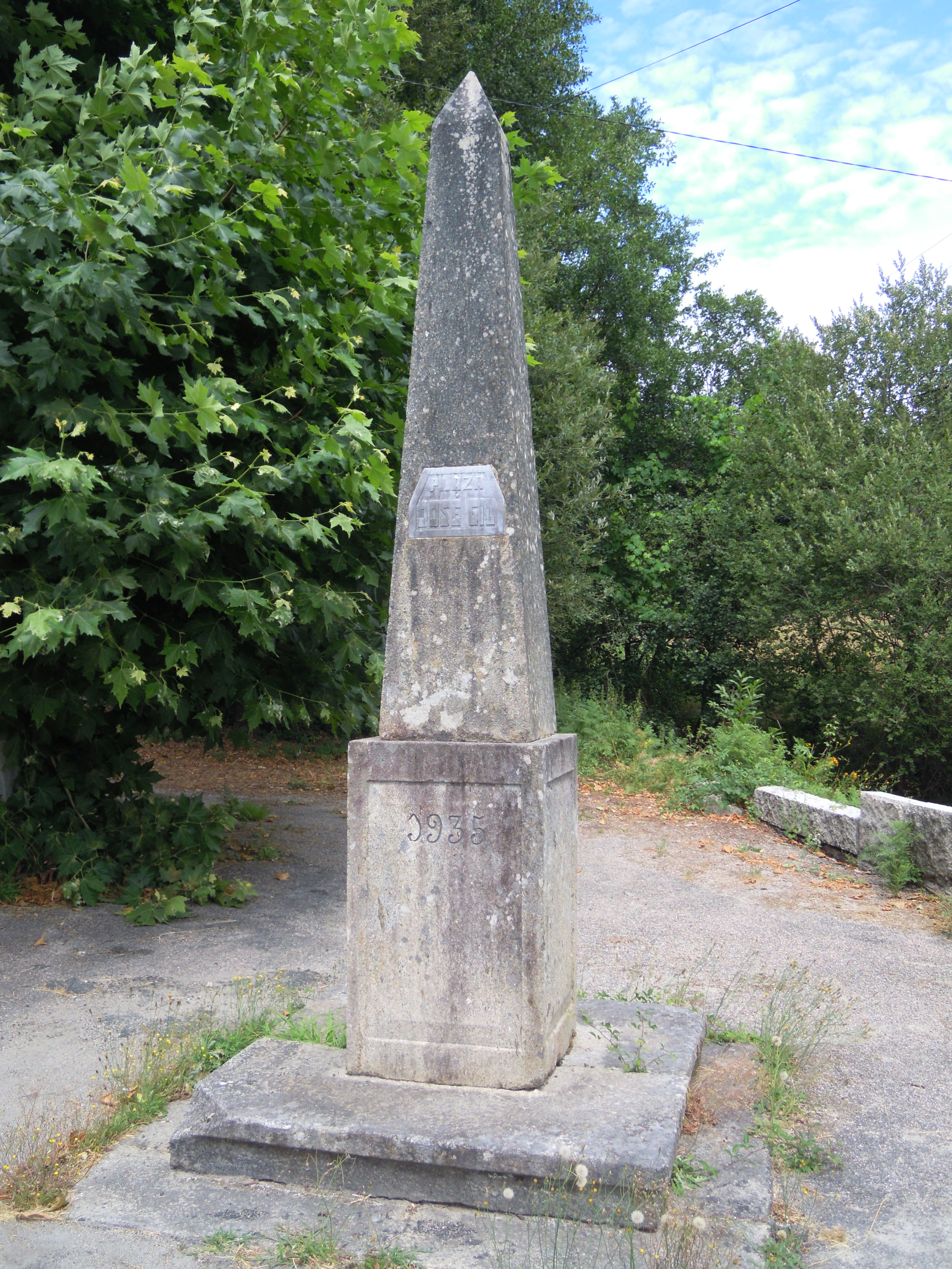 Homenaxe ao fotógrafo Xosé Gil y Gil en Luneda (A Cañiza)